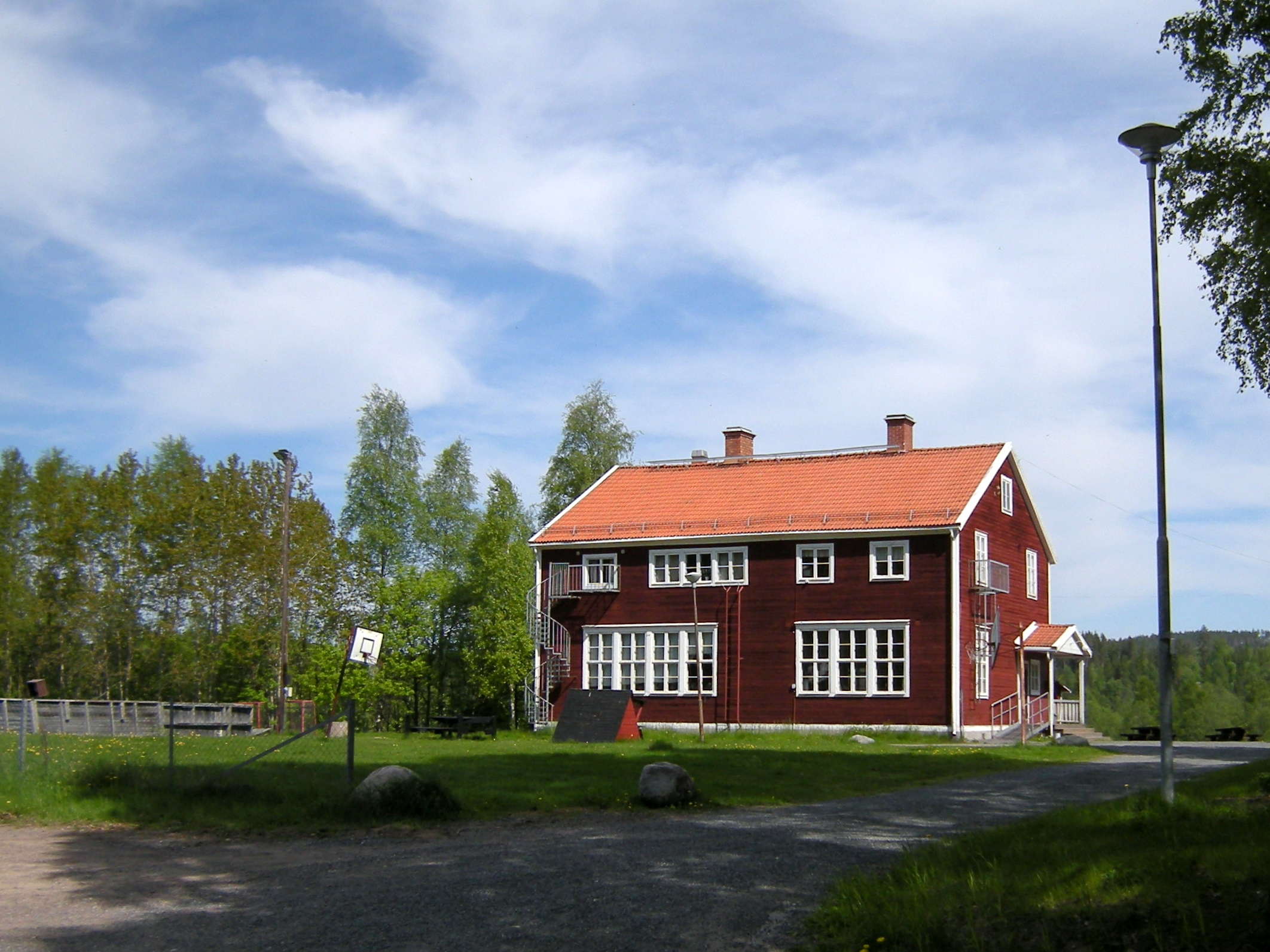 Repbäckens bygdegård.